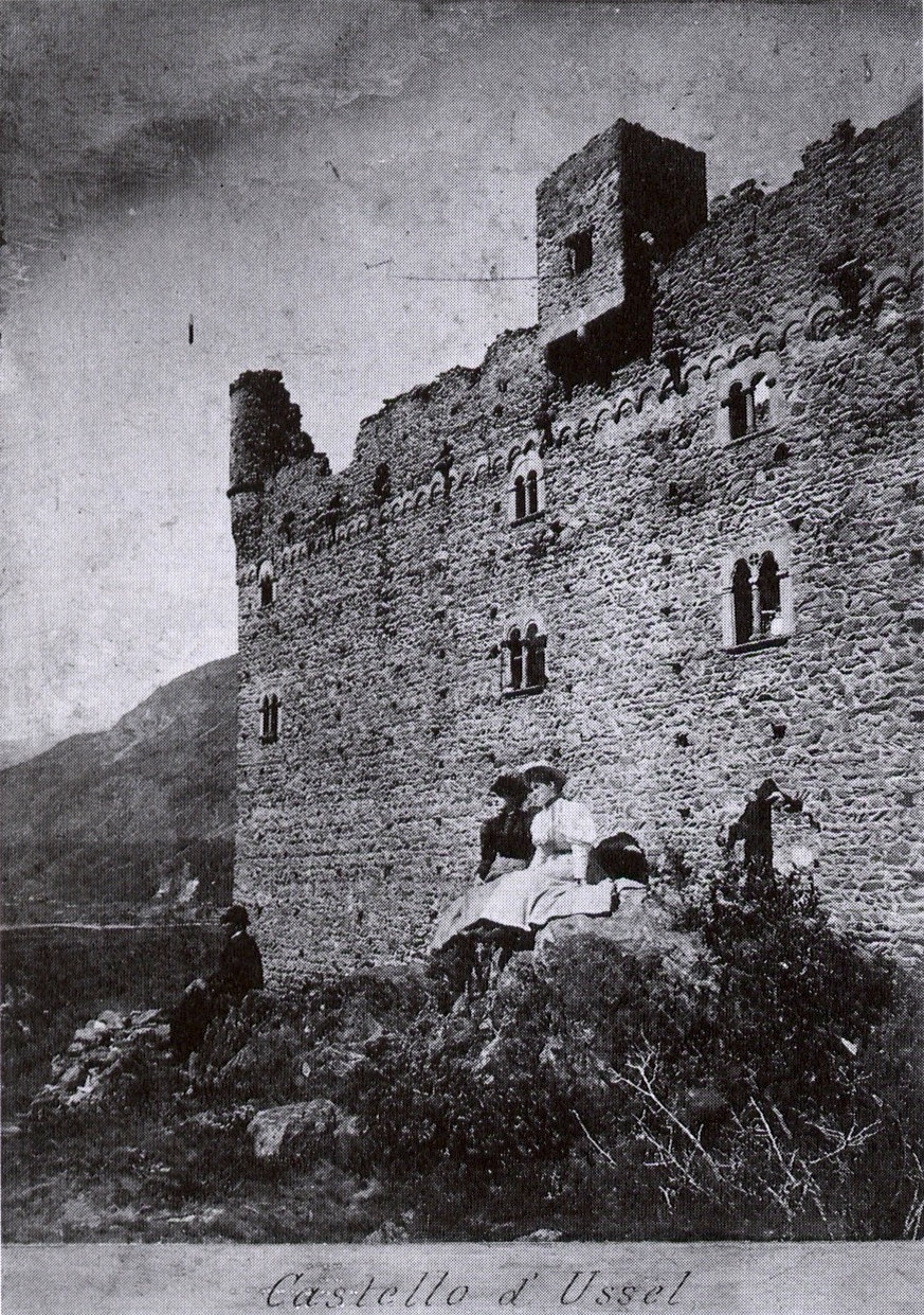 Il Castello di Ussel, Valle d'Aosta, Italia, in una cartolina del 1896. foto: ASBC. Scansione: Patafisik.